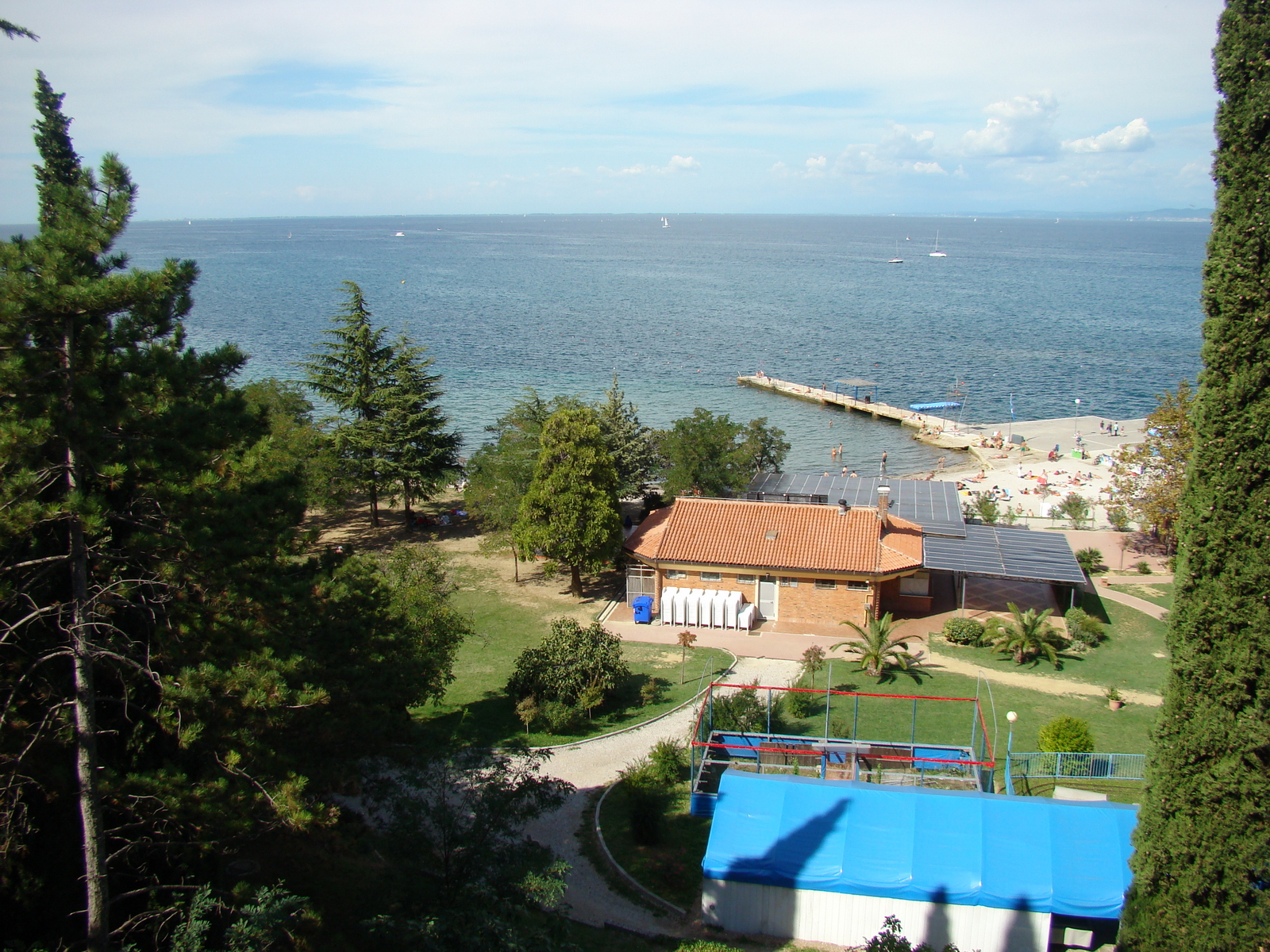 Побережье San Simon